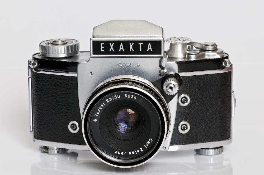 Ihagee Exakta Varex IIb Baujahr ca 1964